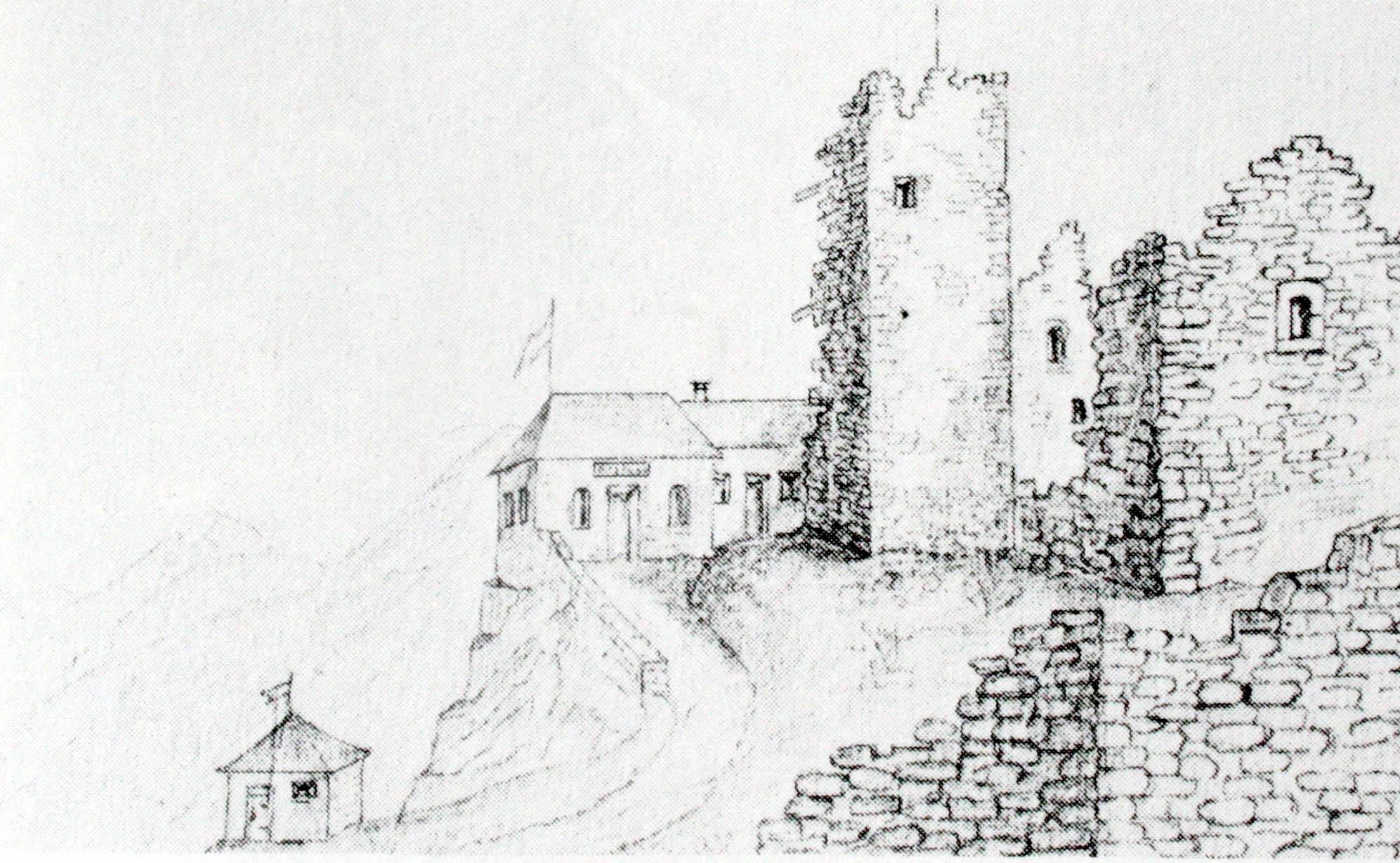 Guardaval um 1880, Ansicht nach P. Staub mit Sommerrestaurant